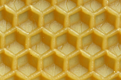 Ausschnitt aus einer Mittelwand, wie sie der Imker in Rähmchen für Bienenwaben einlötet. Darauf ist der Beginn der Zellen bereits auf der ganzen Fläche vorgeprägt, die Bienen können die Wabe dadurch schneller ausbauen und sind auf Zellen für Arbeiterinnenbrut festgelegt, während sie sonst teilweise auch Drohnenzellen bauen würden. Die Zellen haben einen Durchmesser von 5,3mm.